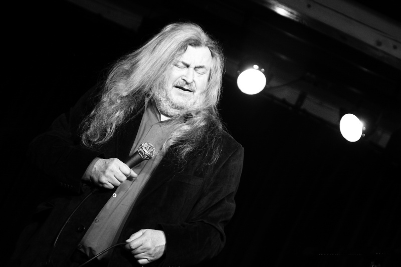 František Ringo Čech na Zámeckém večeru ve Všeradicích u Berouna 18. února 2011